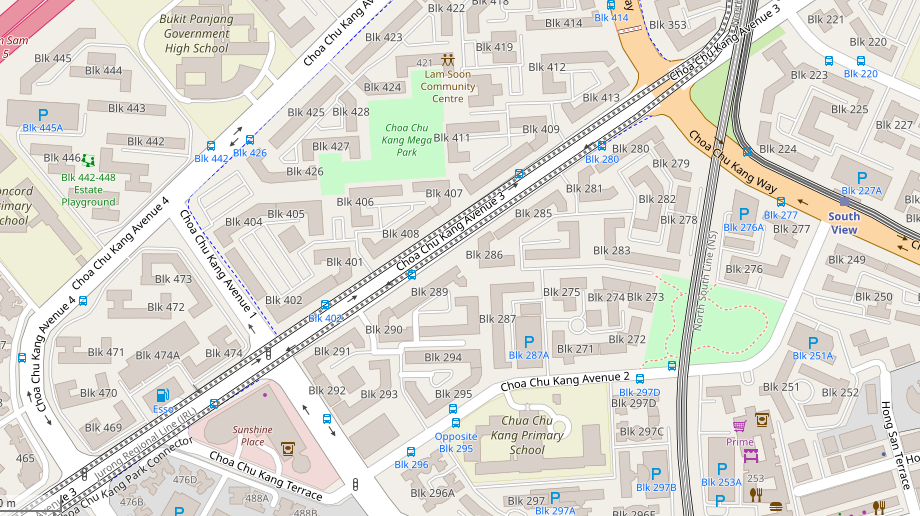 JS2照片